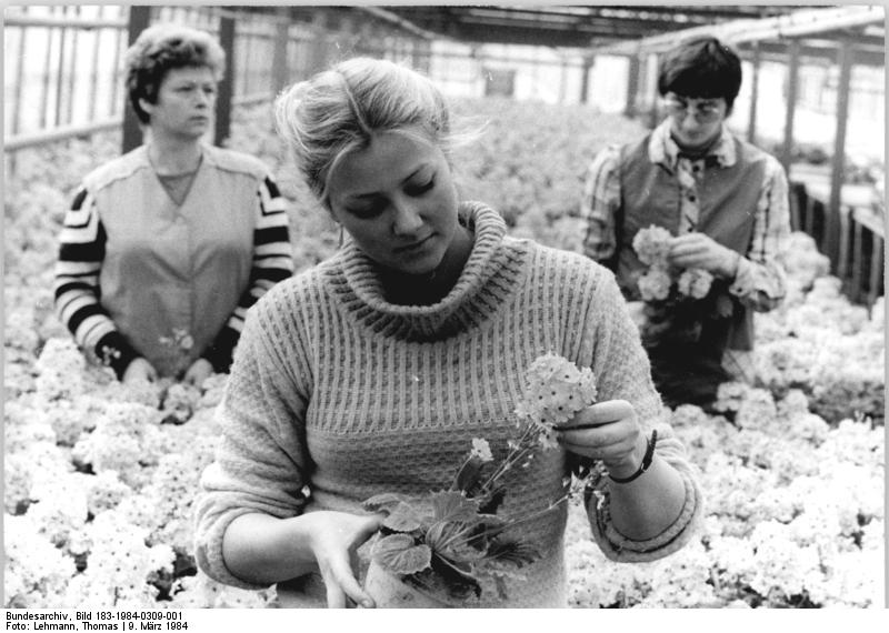 Quedlinburg, Auszubildenen Gärtnerin ADN-ZB Lehmann 9.3.84 Bez. Halle: Topfkulturen, Jungpflanzen und Saatgut stellt das VEG August Bebel Quedlinburg für Gärtnereien, den Saatgutverband sowie für den Einzelhandel zur Verfügung. Sibylle Jacob ist Gärtnerlehrling für Zierpflanzen im zweiten Lehrjahr. Ihr erworbenes Wissen kann sie bereits bei der Anzucht von Primeln im Gewächshaus anwenden.